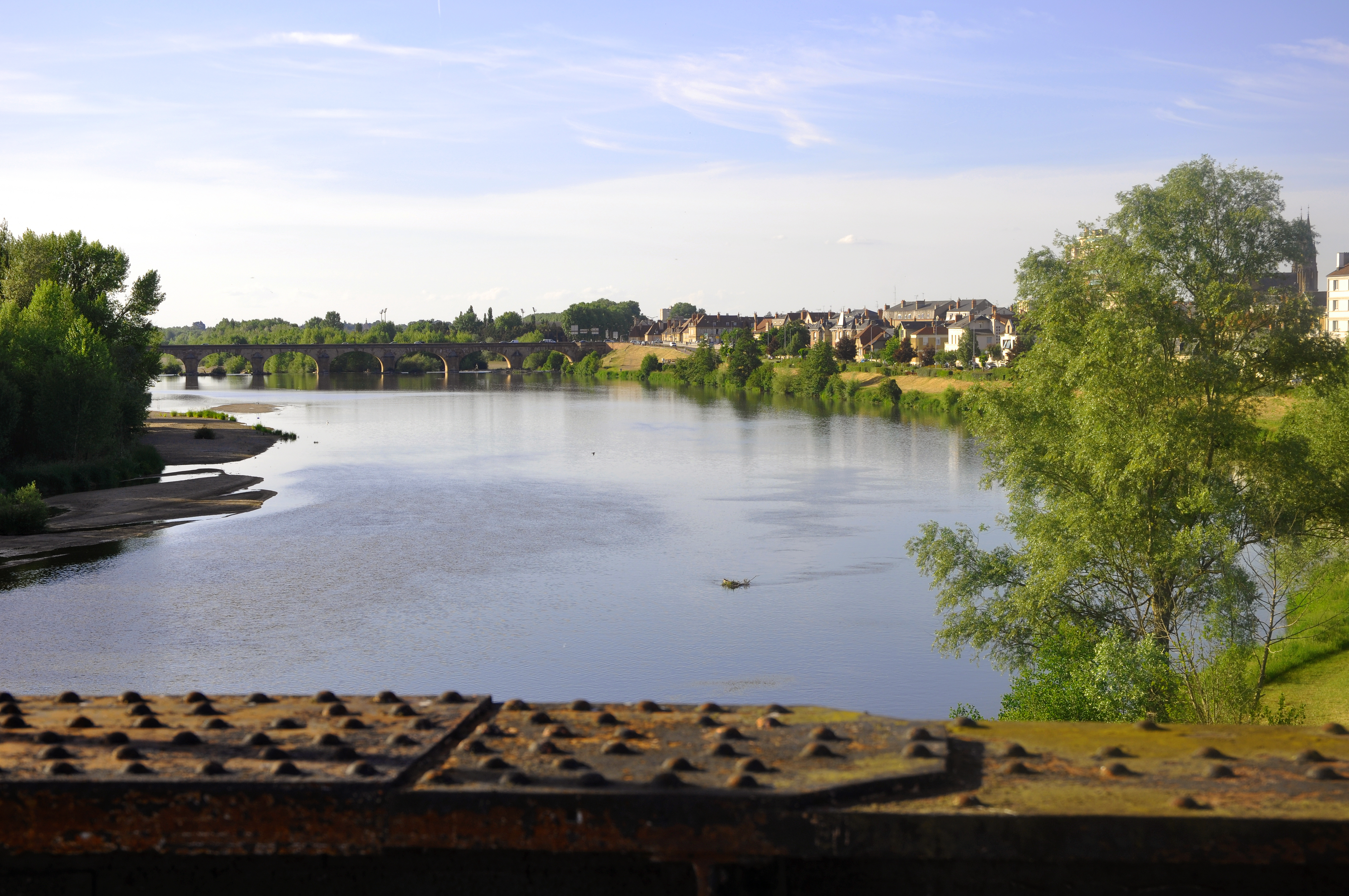 Vue de l'Allier depuis le pont de fer (1858) où passe la Ligne de Montluçon, à Moulins dans l'Allier, en France. On voit en arrière plan, à gauche le pont Régemortes (18e siècle), à droite le quartier des mariniers.